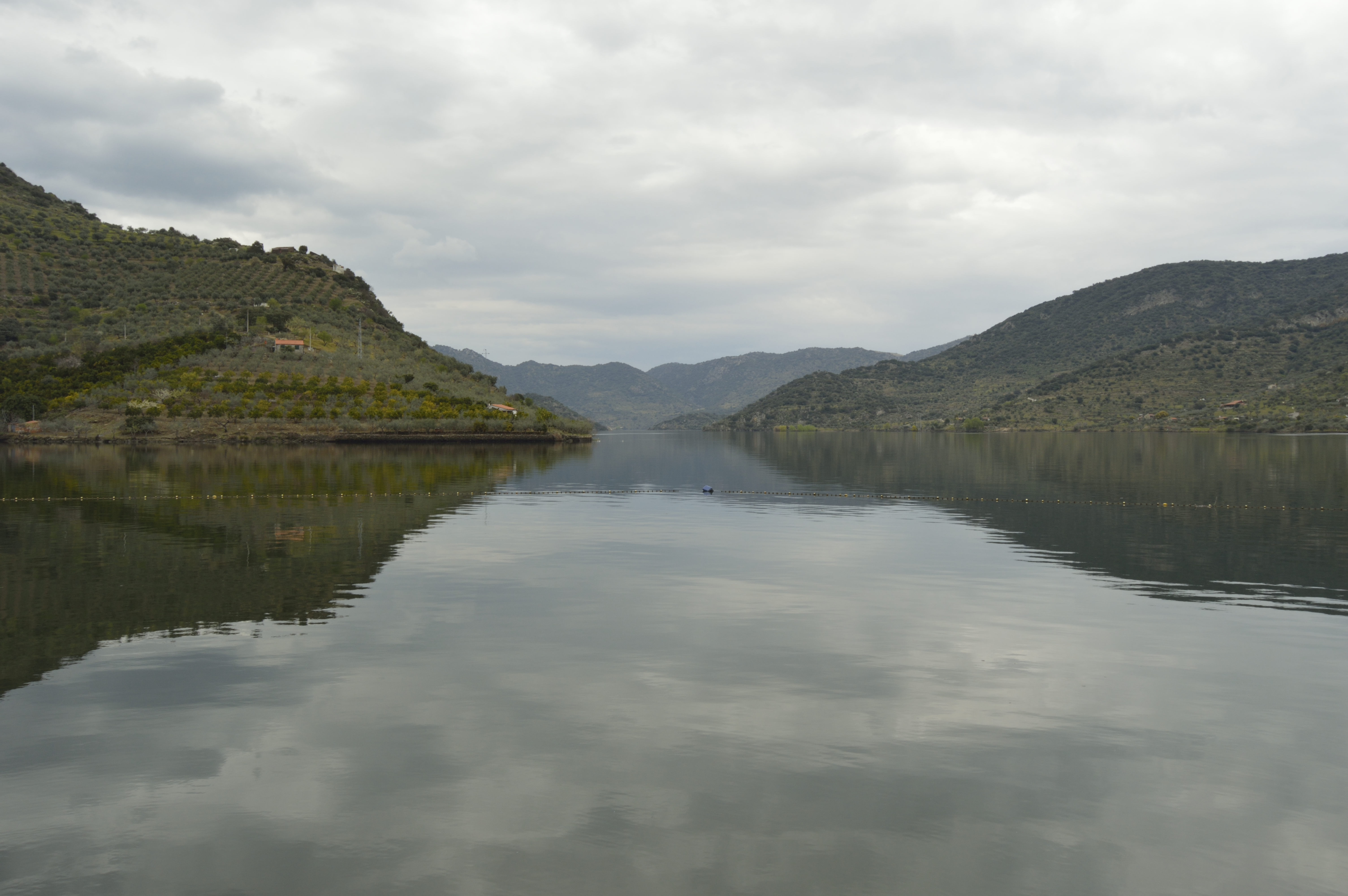 Fotografia captada na praia fluvial da Congida. O rio, as encostas, as nuvens, os relfexos, a calma e a harmonia foram um excelente momento de ligação com a natureza This is a photography of a Site of Community Importance in Portugal with the ID: PTCON0022. Natura2000 entry, EEA entry